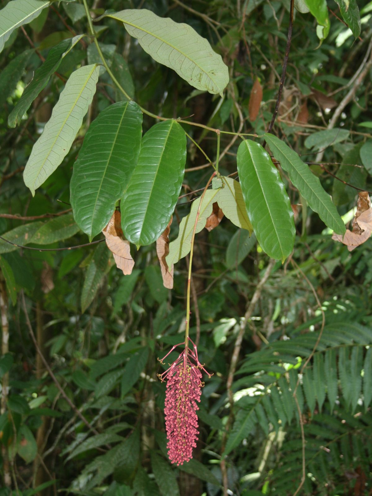 Mabea occidentalis, Wolfsmilchgewächse (Euphorbiaceae) - Costa Rica: Prov. Puntarenas, La Gamba NW Golfito, "Fila Trail" WNW "Esquinas Rainforest Lodge"